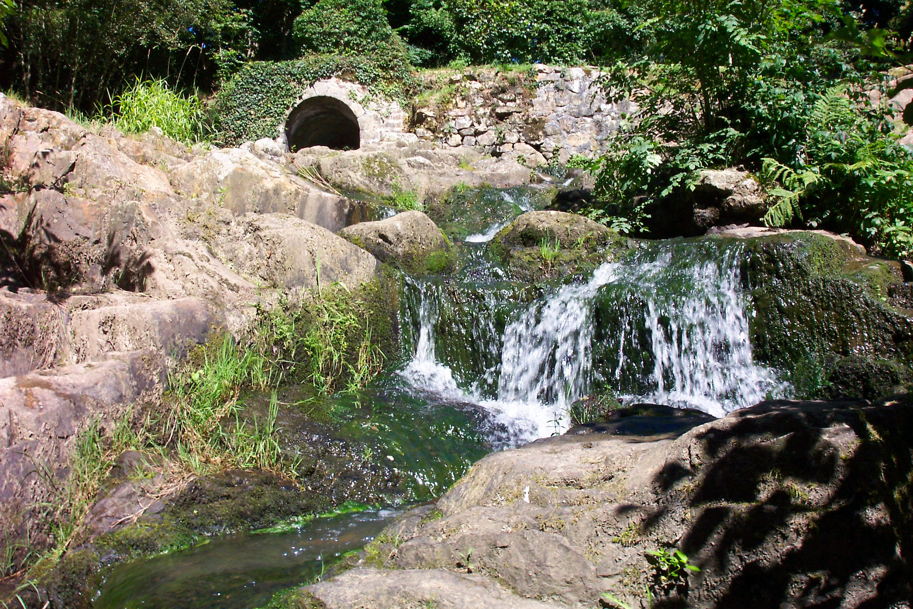 Le pont du diable au sommet de la petite cascade, en limite des communes du Neufbourg et de Romagny.